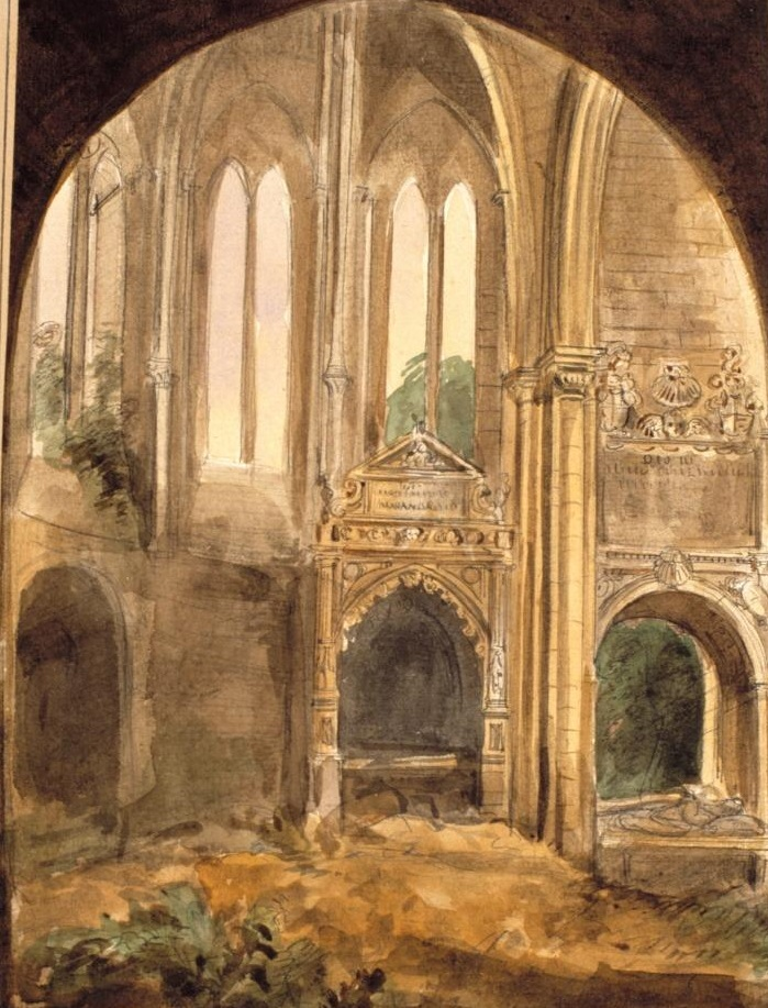 Ruinas del interior de la iglesia del desaparecido monasterio de San Francisco de Burgos, provincia de Burgos, (España). El grabado pertenece a la colección del Museo Lázaro Galdiano de Madrid.